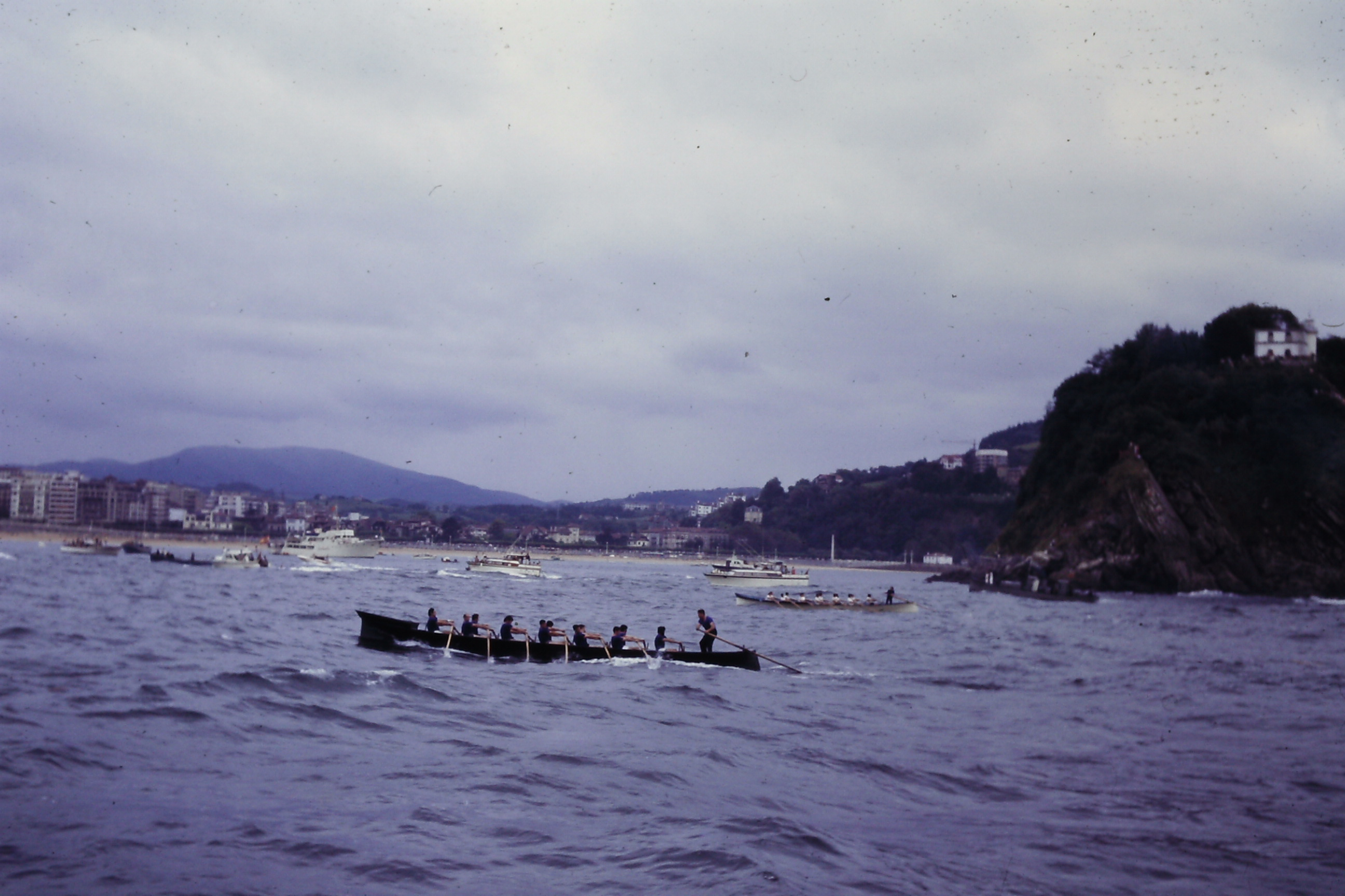 Donostia eta Astilleroko traineruak, Kontxako Banderan, 1976